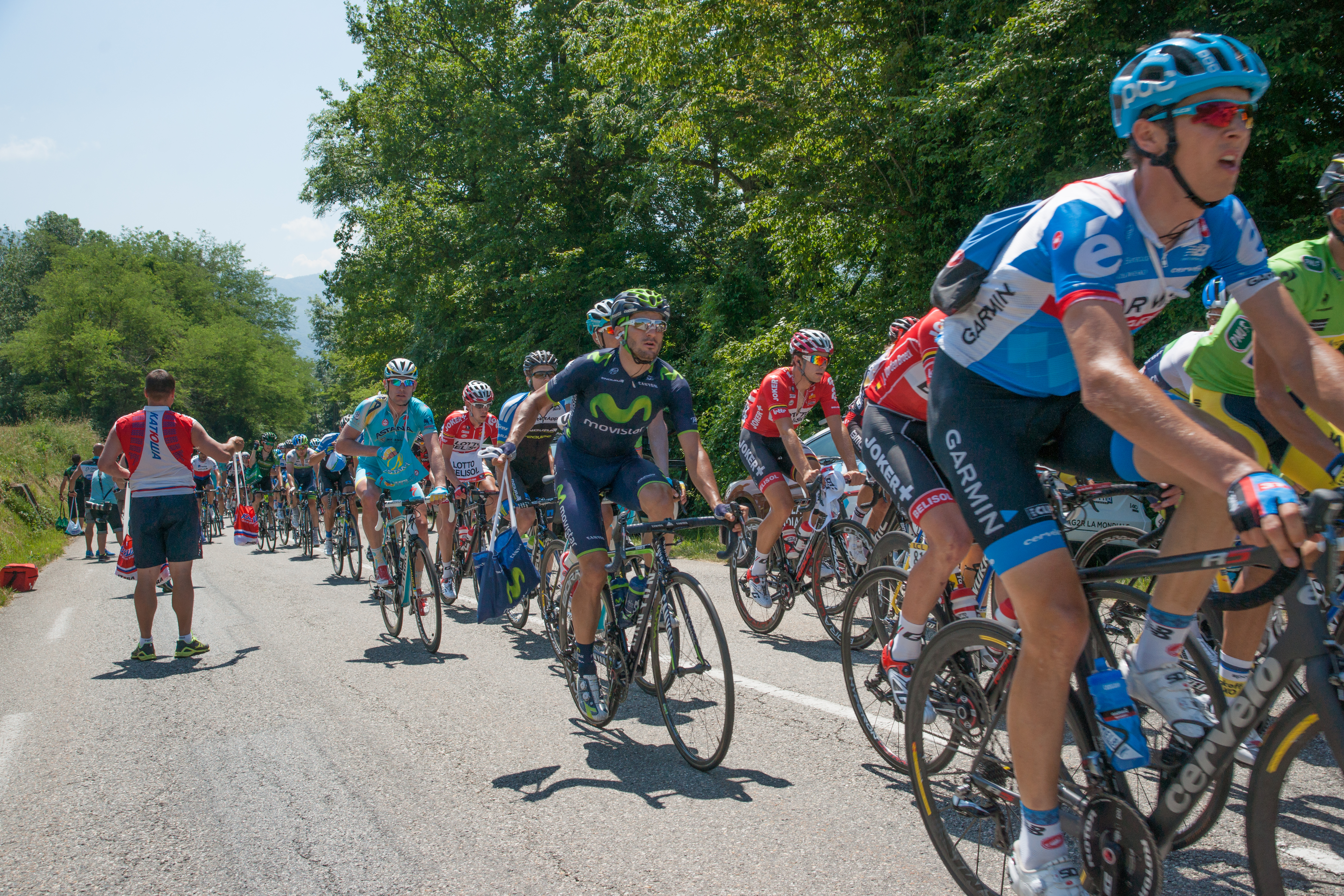 Critérium du Dauphiné 2014 - Etape 6 -Peloton au ravitaillement